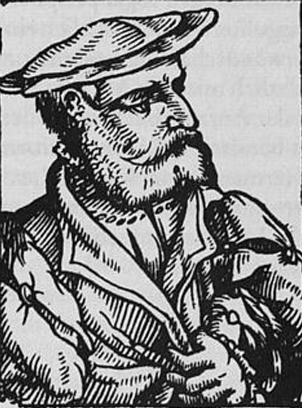 Gisbert Longolius, Holzschnitt aus der „Prosopographia heroum atque illustrium virorum totius Germaniae“ des Heinrich Pantaleon, 1565–66